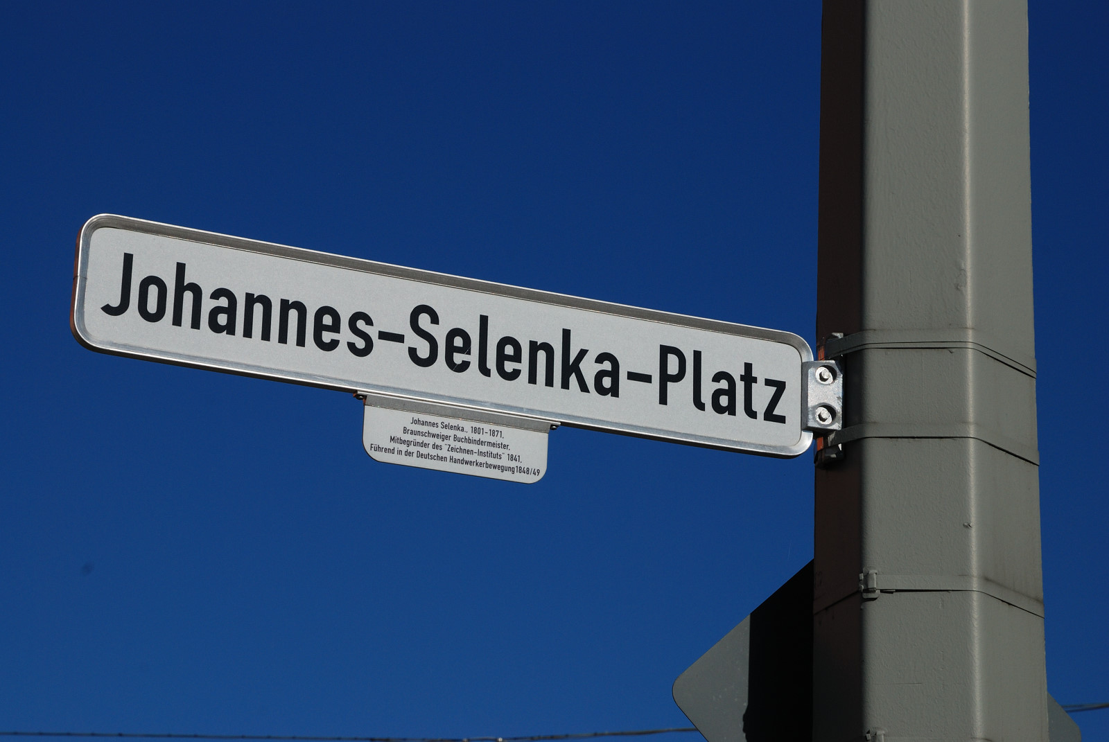 Straßenschild am Johannes-Selenka-Platz in Braunschweig, im Oktober 2015